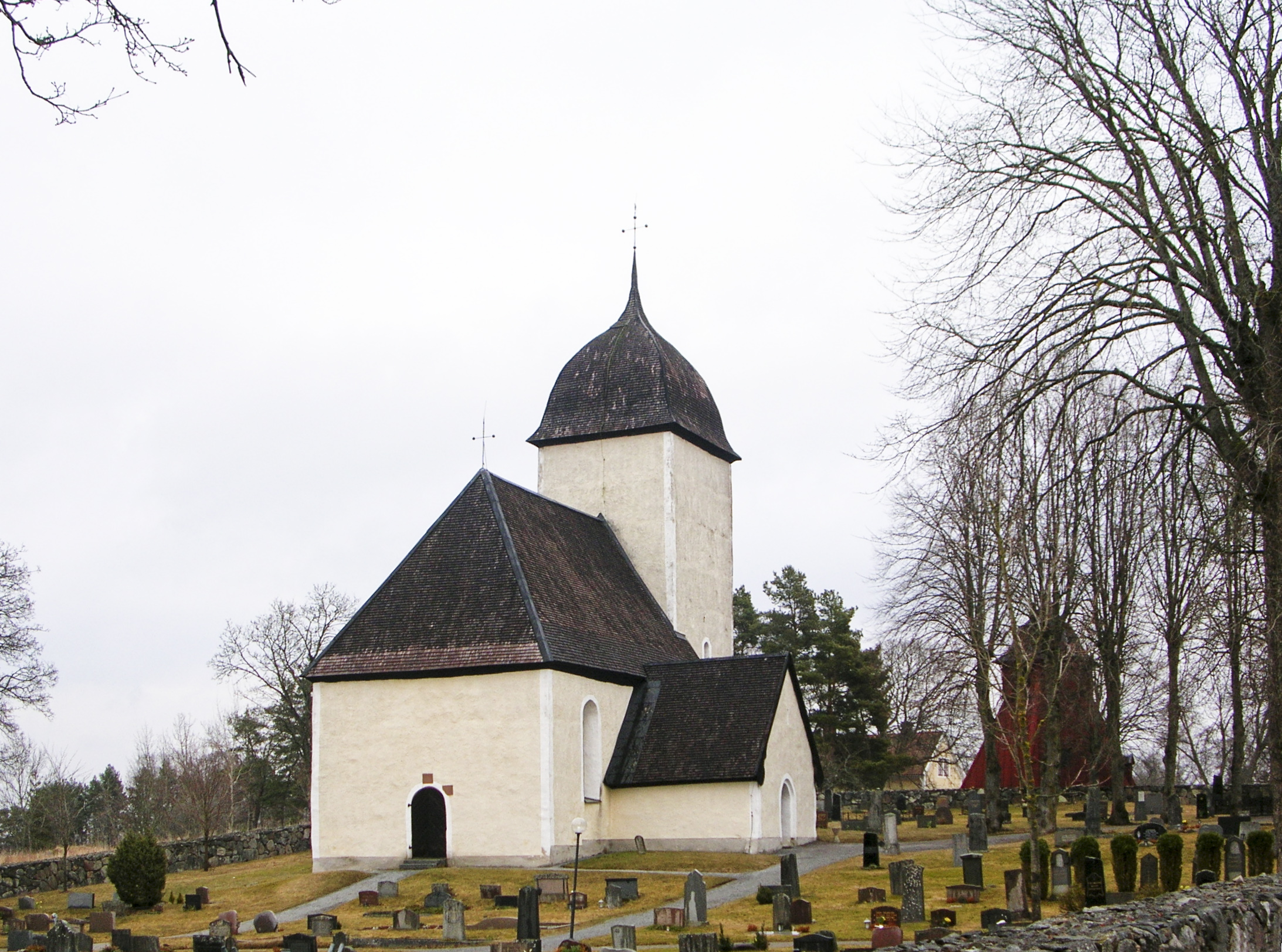 Husby-Ärlinghundra kyrka, Husby-Ärlinghundra församling, Sigtuna kontrakt, Uppsala stift / Diocese of Uppsala.